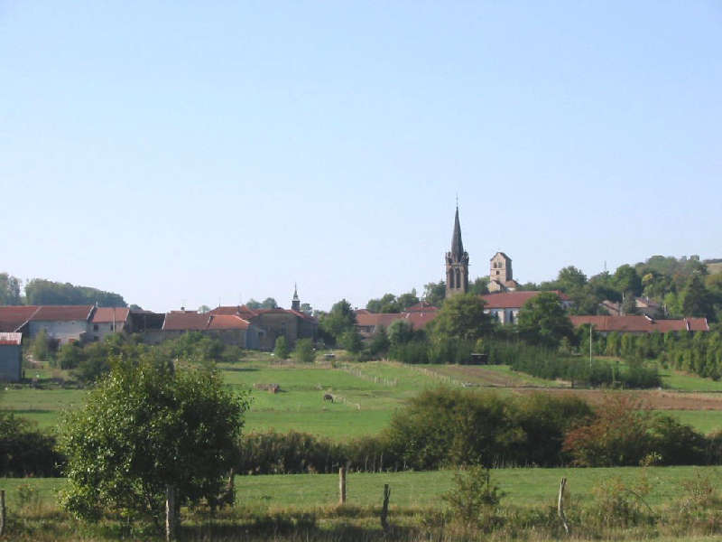 Vue générale de Médonville (Vosges)